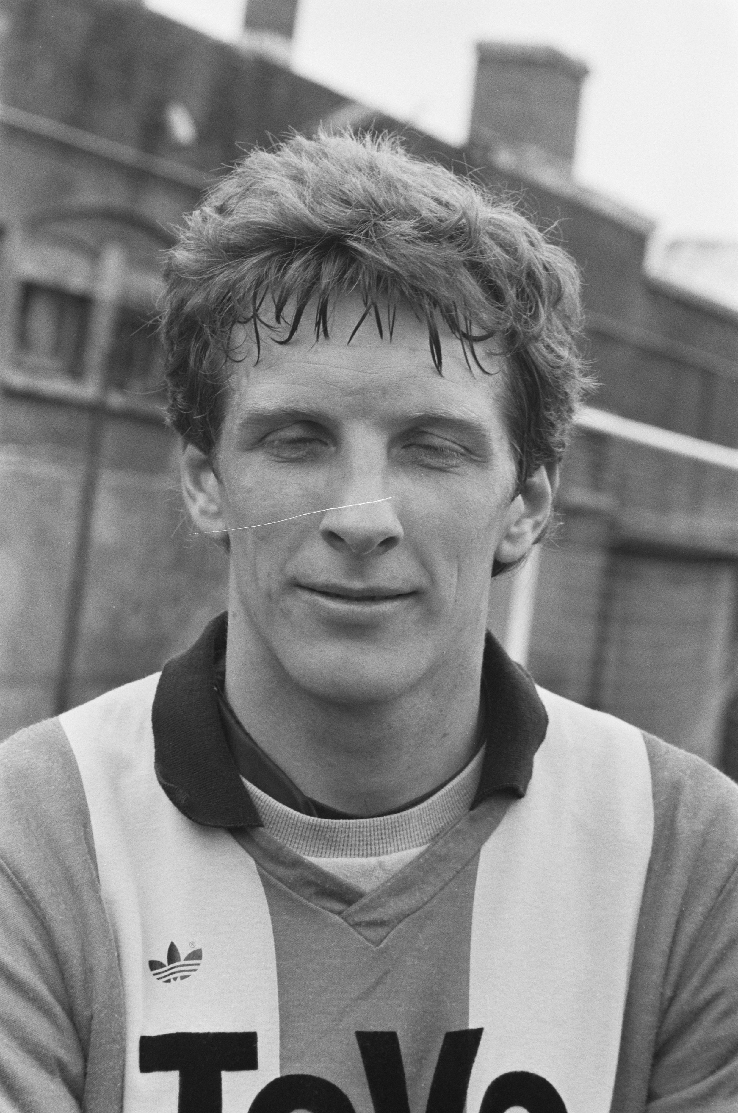 Collectie / Archief : Fotocollectie Anefo Reportage / Serie : [ onbekend ] Beschrijving : KV Mechelen , de Nederlandse inbreng; 13a: Wim Hofkens , kop, nr. 14, 15: Graeme Rutjes , koppen Datum : 3 mei 1988 Trefwoorden : sport, voetbal Persoonsnaam : Graeme Rutjes, Hofkens, Wim Fotograaf : Bogaerts, Rob / Anefo Auteursrechthebbende : Nationaal Archief Materiaalsoort : Negatief (zwart/wit) Nummer archiefinventaris : bekijk toegang 2.24.01.05 Bestanddeelnummer : 934-2422